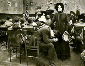 Jack J. Clark and Gene Gauntier